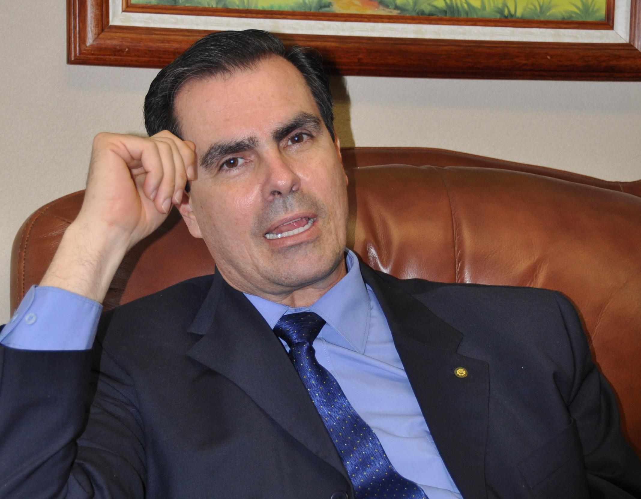 Eugenio Trejos, quinto rector del Tecnológico de Costa Rica